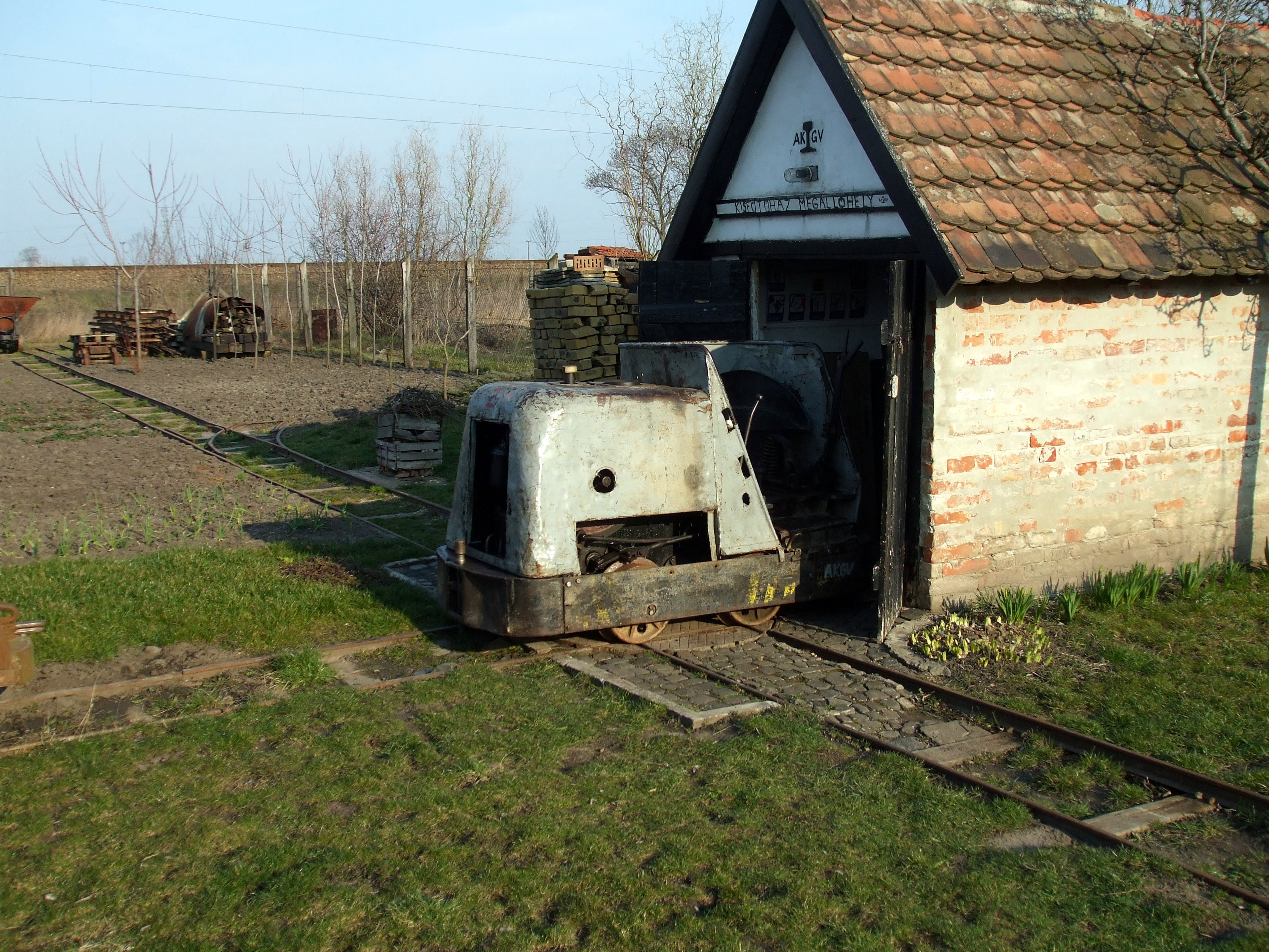 A Békési Téglagyárból származó Motoros Vontató az Alföldi Kerti Gazdasági Vasút fűtőháza előtt.